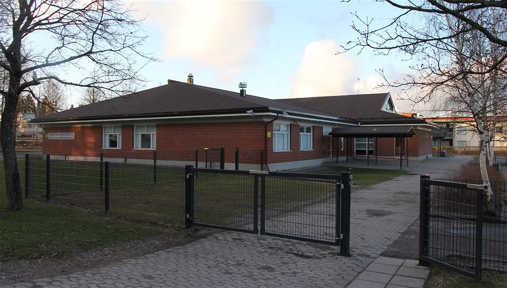 Hämeenkylän koulu on Vantaan Variston kaupunginosassa sijaitseva suomenkielinen yhtenäiskoulu. Kouluun kuului keväällä 2016 kaksi rakennuskokonaisuutta: kuvan pienempi Variston opetuspiste osoitteessa Varistontie 1 ja suurempi Hämeenkylän koulu osoitteessa Varistontie 3.